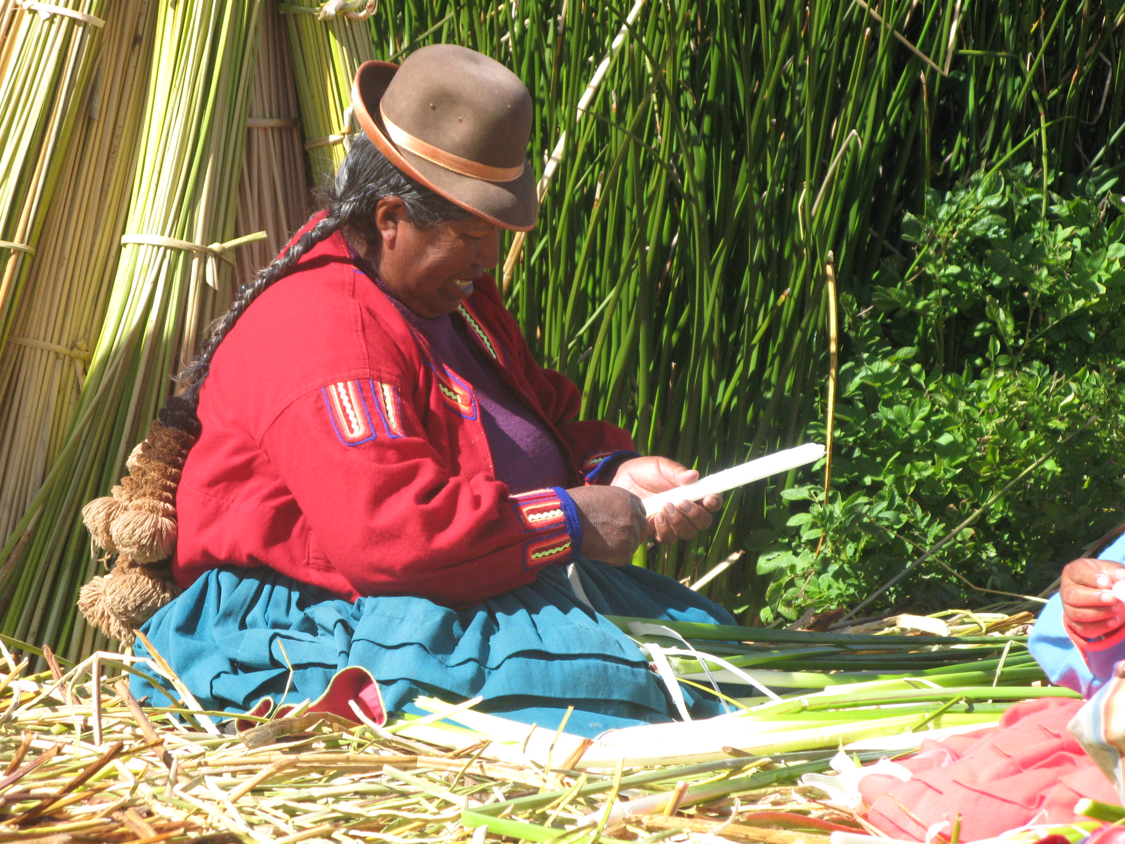 Domačinka na otoku Uros na jezeru Titicaca